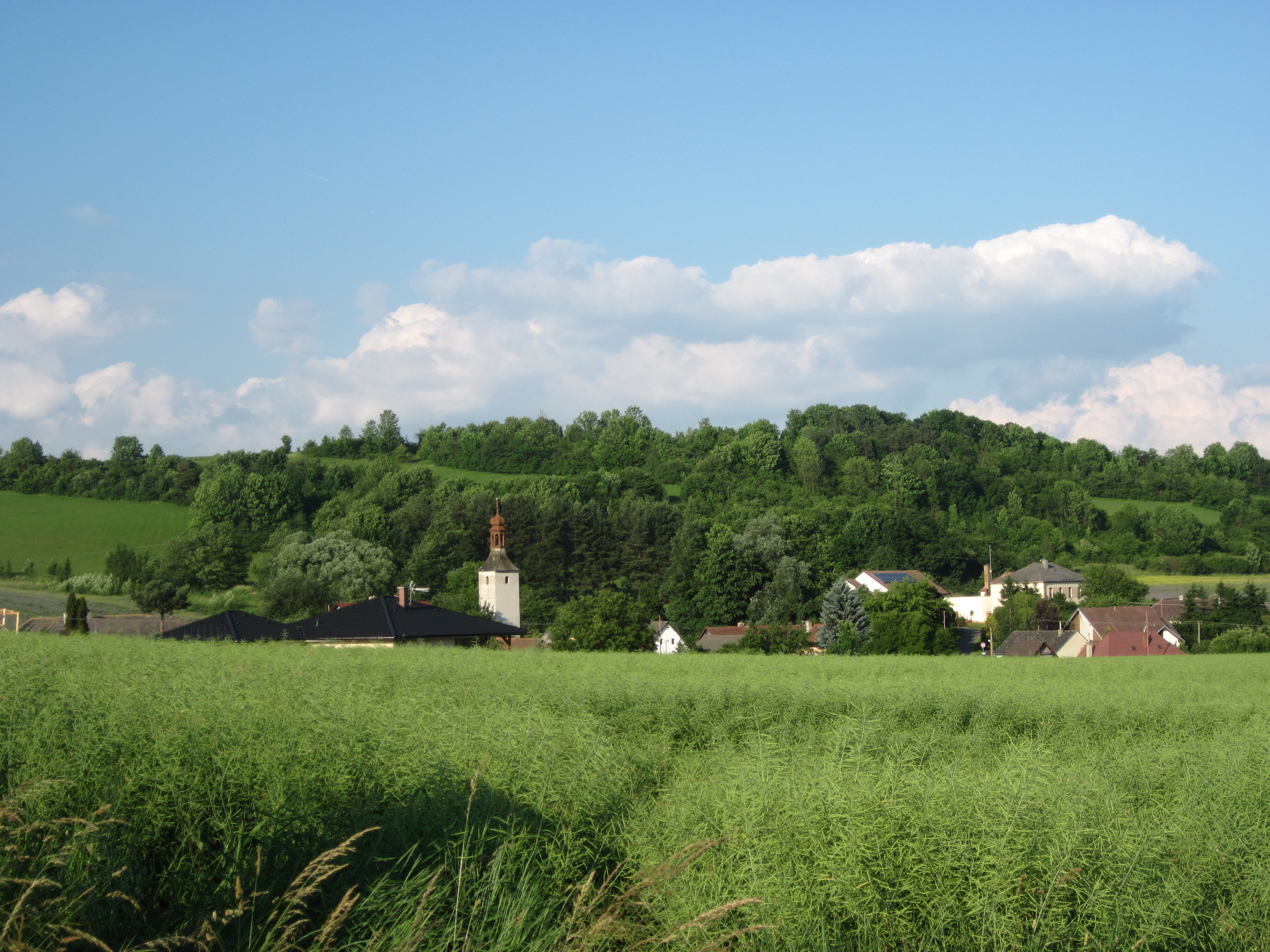 Pohled na obec ze silnice na Městečko Trnávka